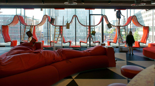 Värdens första Tweenie-bibliotek TioTretton Kulturhuset Stockholm